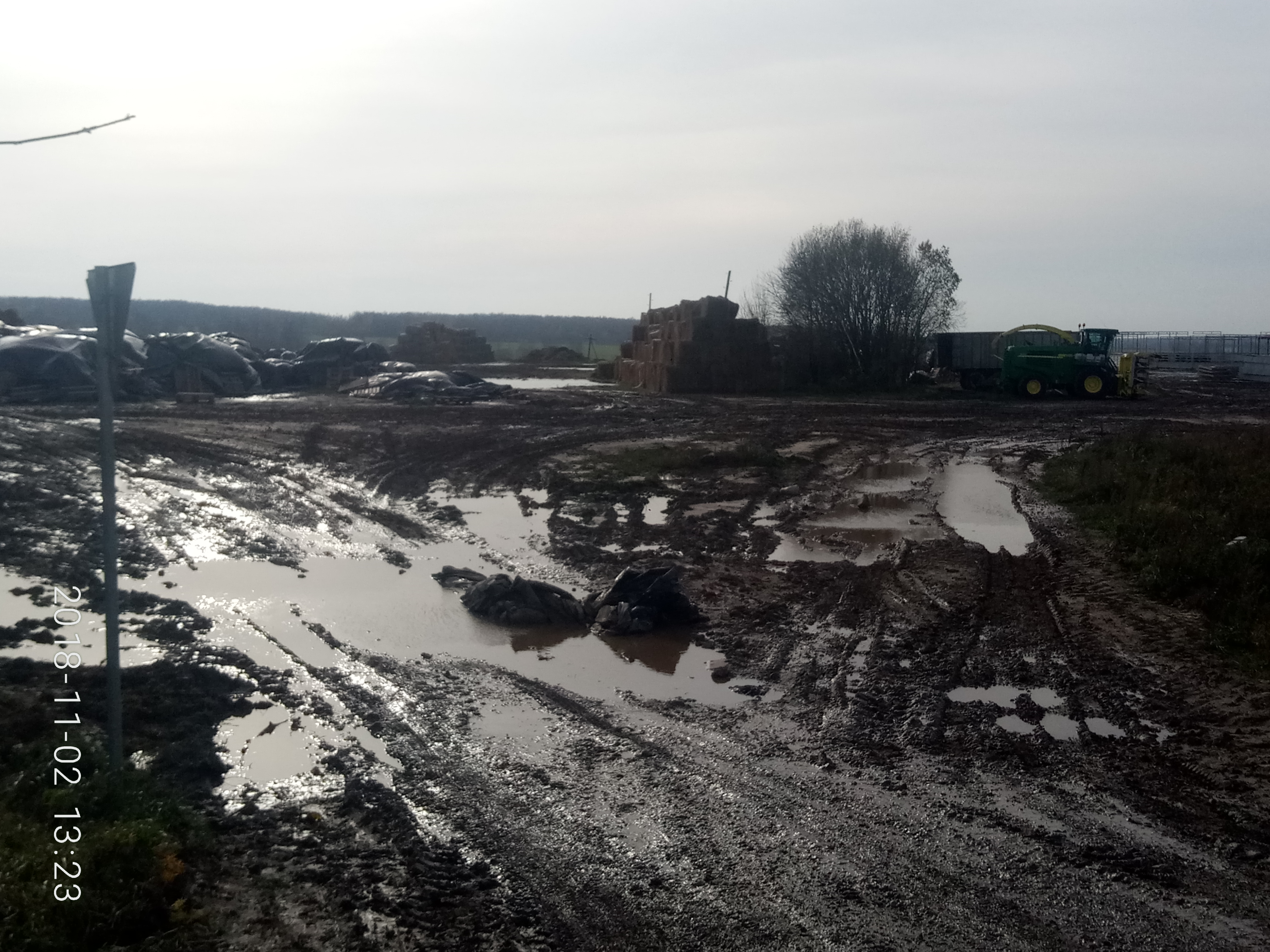 Ферма Мираторга в Калужской области